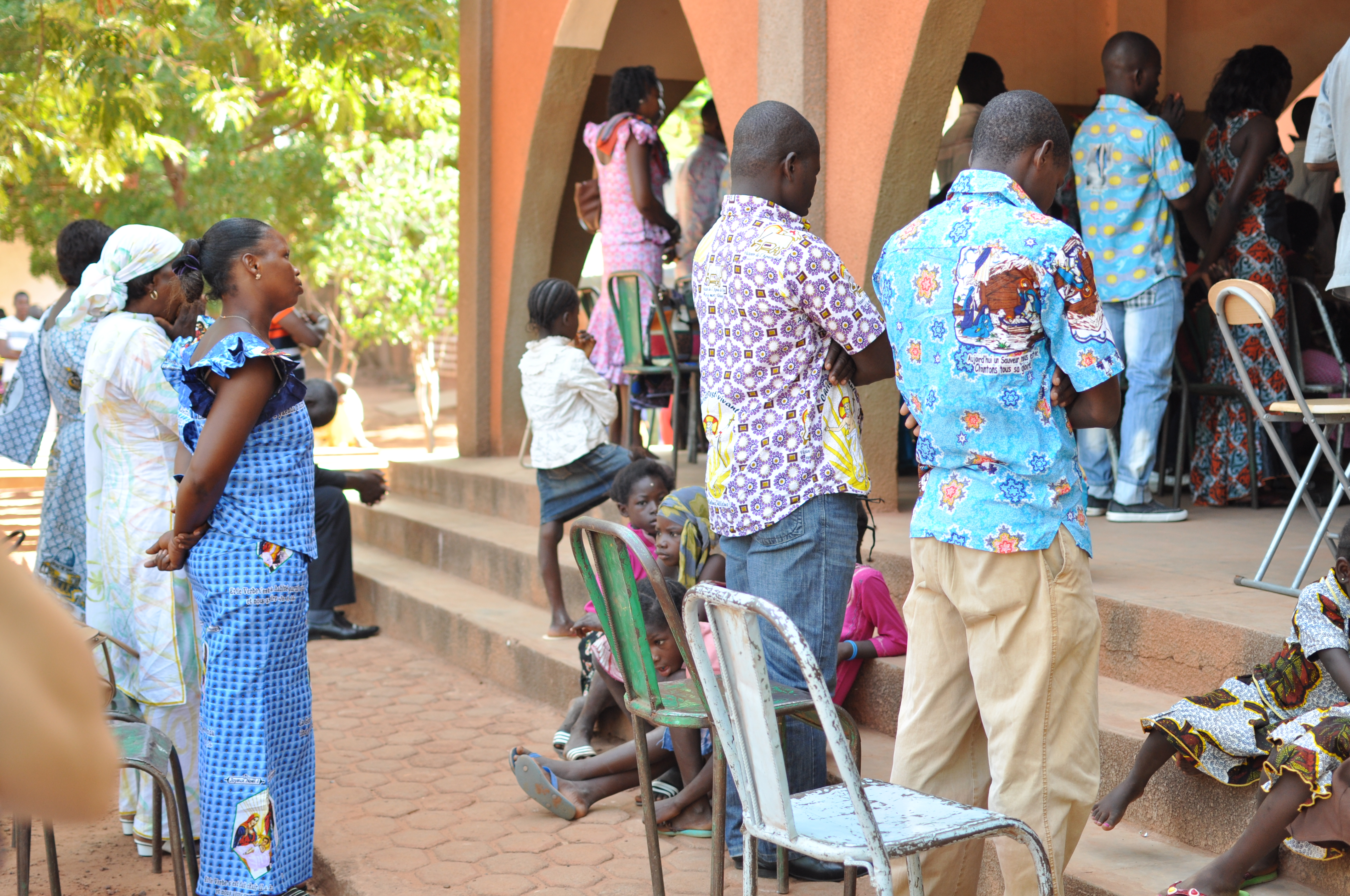 Como cada domingo en una pequeña iglesia de la cuidad de Bobo-Dioulasso, los y las burkinabesas se visten de fiesta... This is an image of Cultural Fashion or Adornment from Burkina Faso